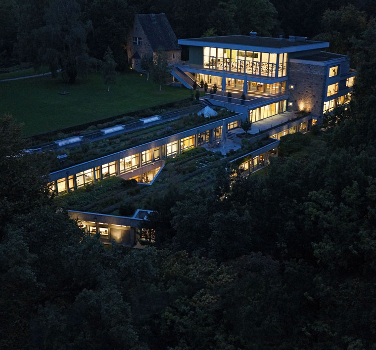 Think Tank und Event-Location